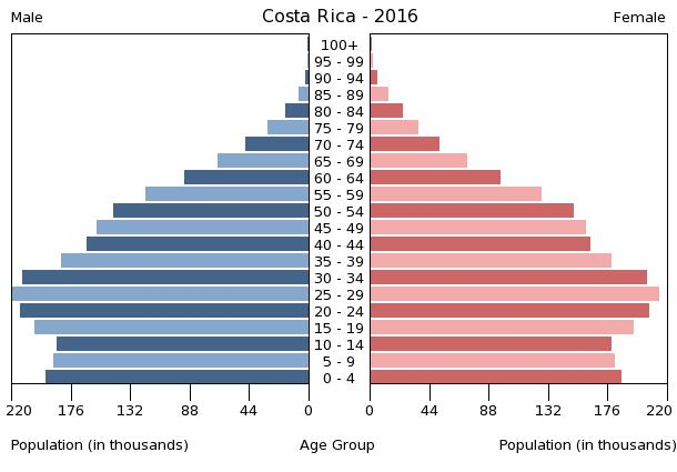 A population pyramid illustrates the age and sex structure of a country's population and may provide insights about political and social stability, as well as economic development. The population is distributed along the horizontal axis, with males shown on the left and females on the right. The male and female populations are broken down into 5-year age groups represented as horizontal bars along the vertical axis, with the youngest age groups at the bottom and the oldest at the top. The shape of the population pyramid gradually evolves over time based on fertility, mortality, and international migration trends.